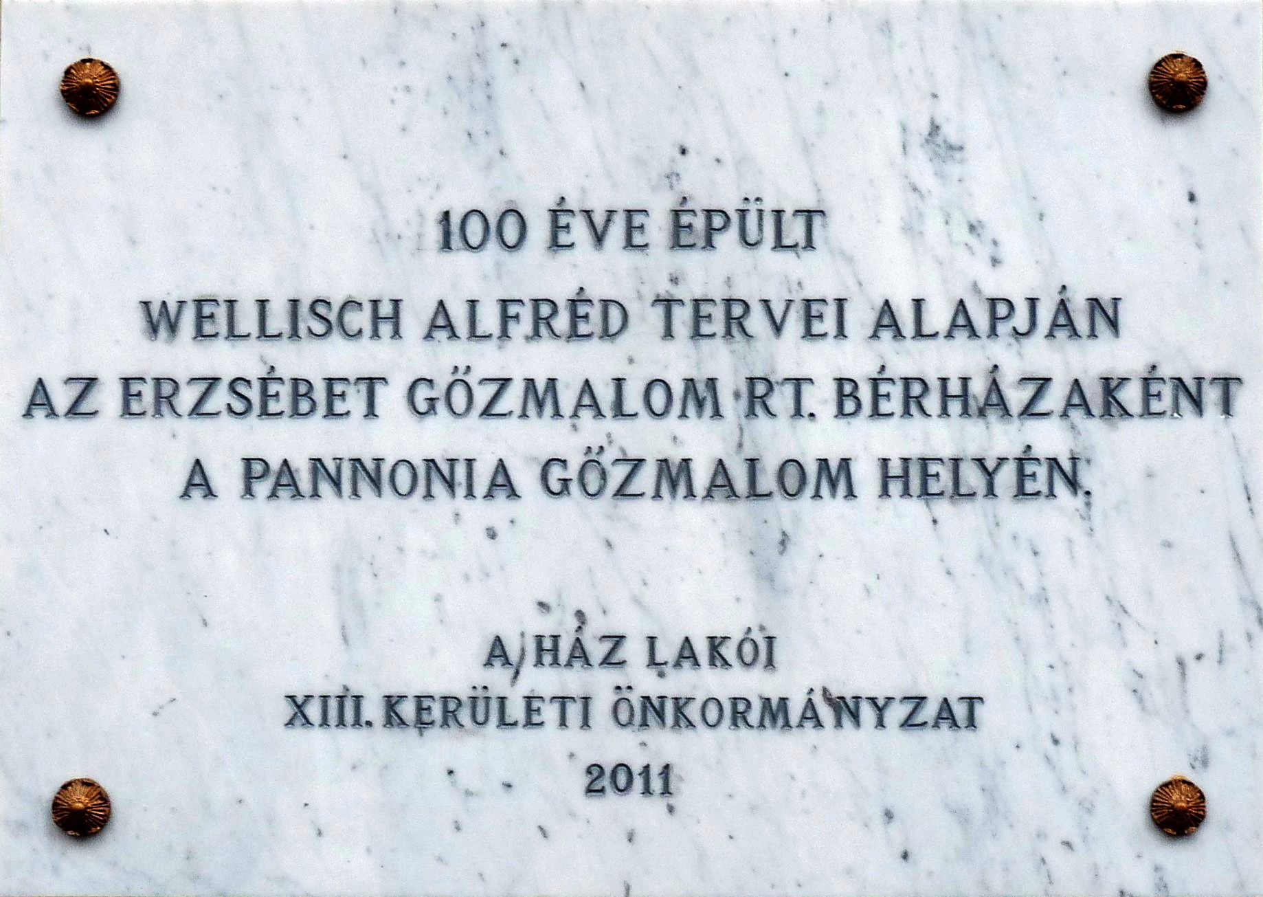 Az egykori Erzsébet Gőzmalom Rt. nyugdíjalapi bérházának 100. évfordulós emléktáblája. Az épületet a Pannónia gőzmalom helyén emelték 1911-ben Wellisch Alfréd tervei alapján. Felavatva: 2011. december 13-án. Budapest, XIII. ker., Kárpát utca 7/b.